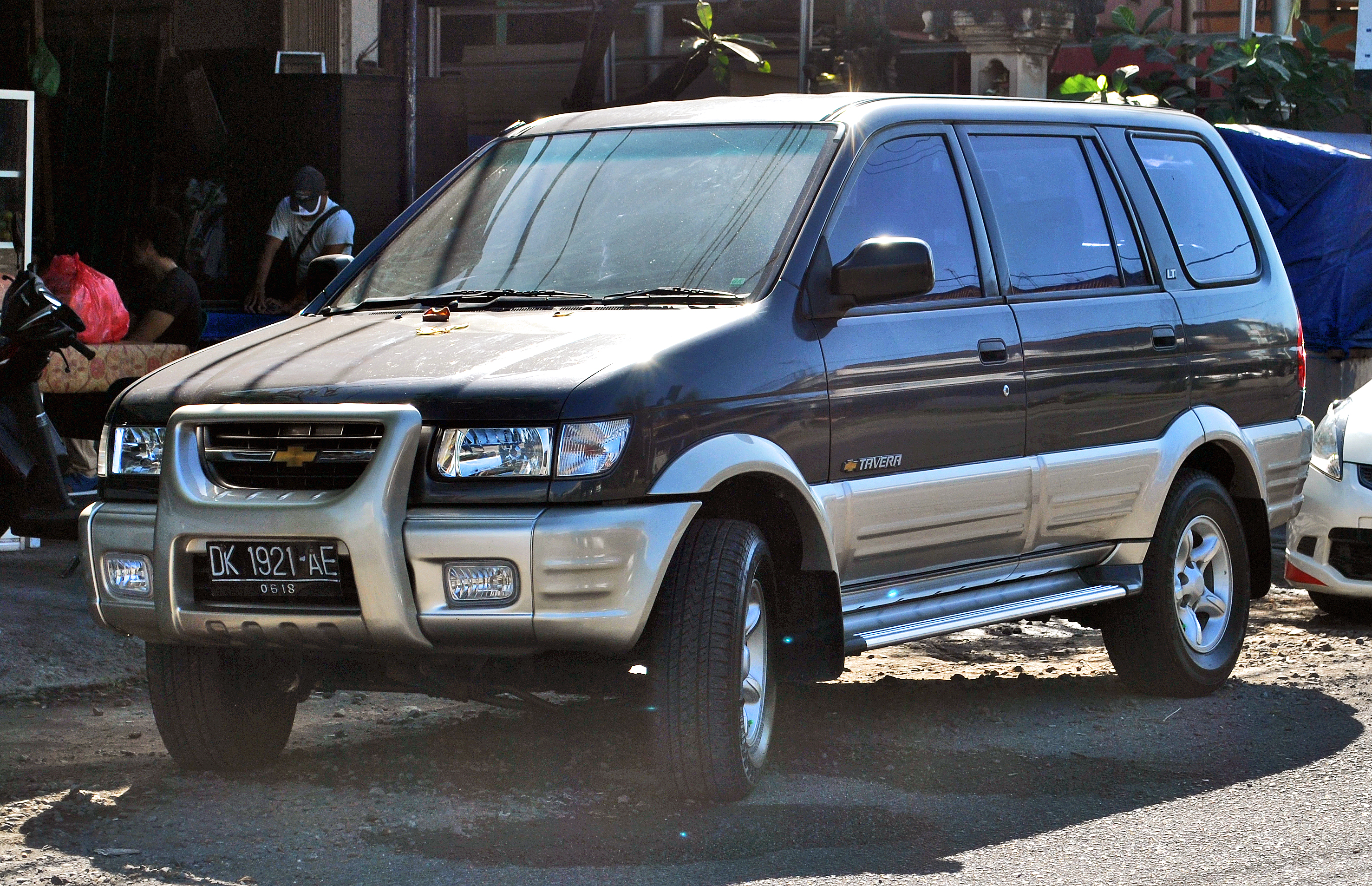 Bagian depan kiri Chevrolet Tavera 2.2, yang ditemukan di Panjer, Denpasar, Bali. Jarang ditemui karena kurang laku dibanding dengan kembarannya, Isuzu Panther.